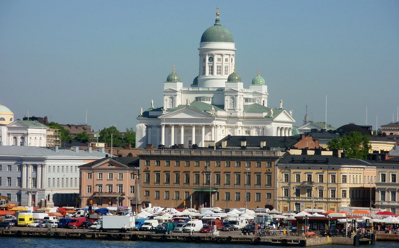 Helsingin tuomiokirkko. Kuva on otettu M/S Silja Serenadelta